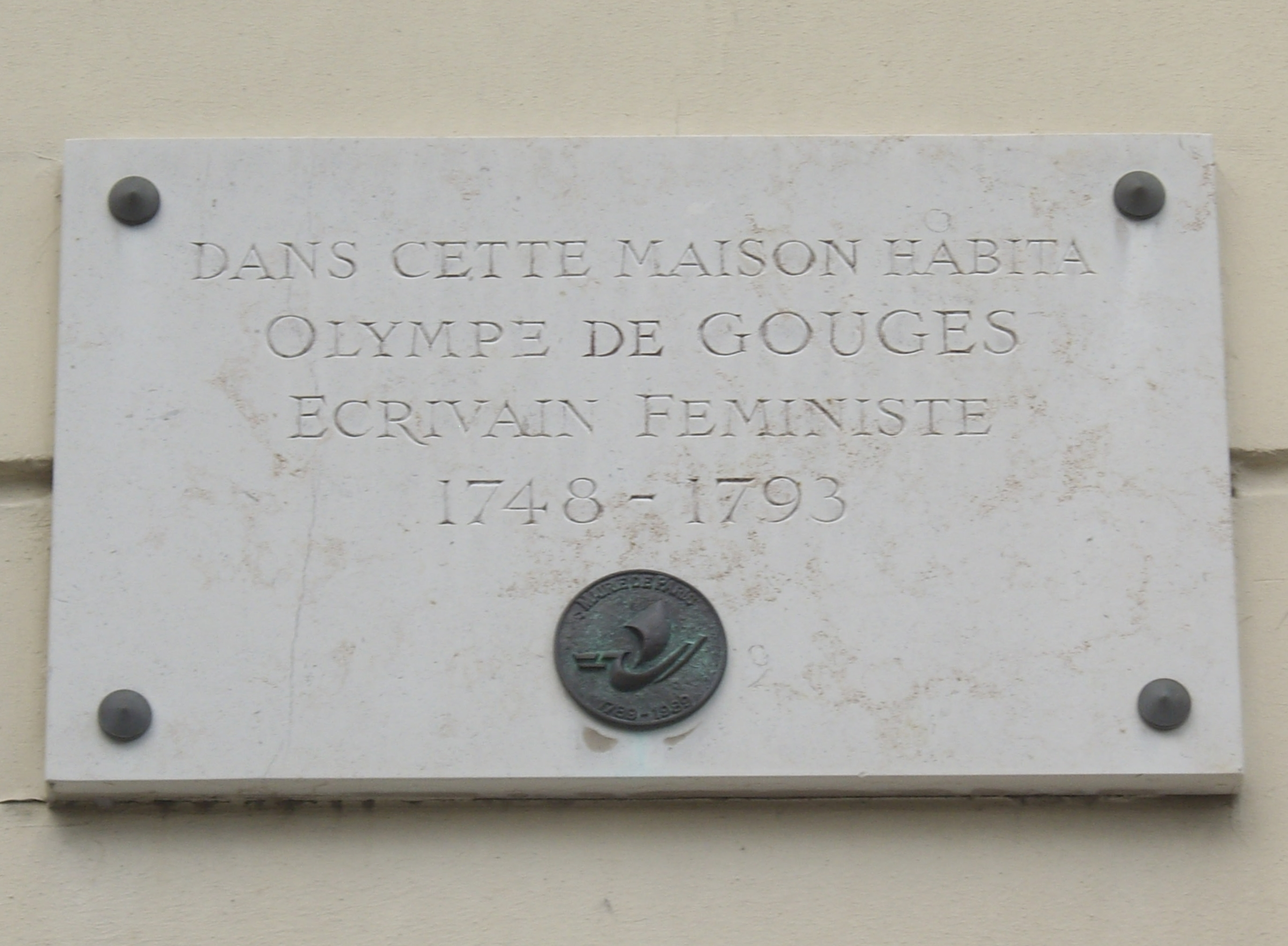 Plaque commémorative, 4 rue du Buis, Paris 16e. « Dans cette maison habita Olympe de Gouges, écrivain féministe, 1748-1793. »